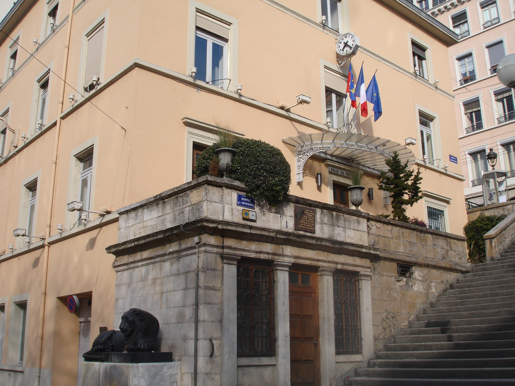 Lyon place Sathonay : mairie du 1er arrondissement